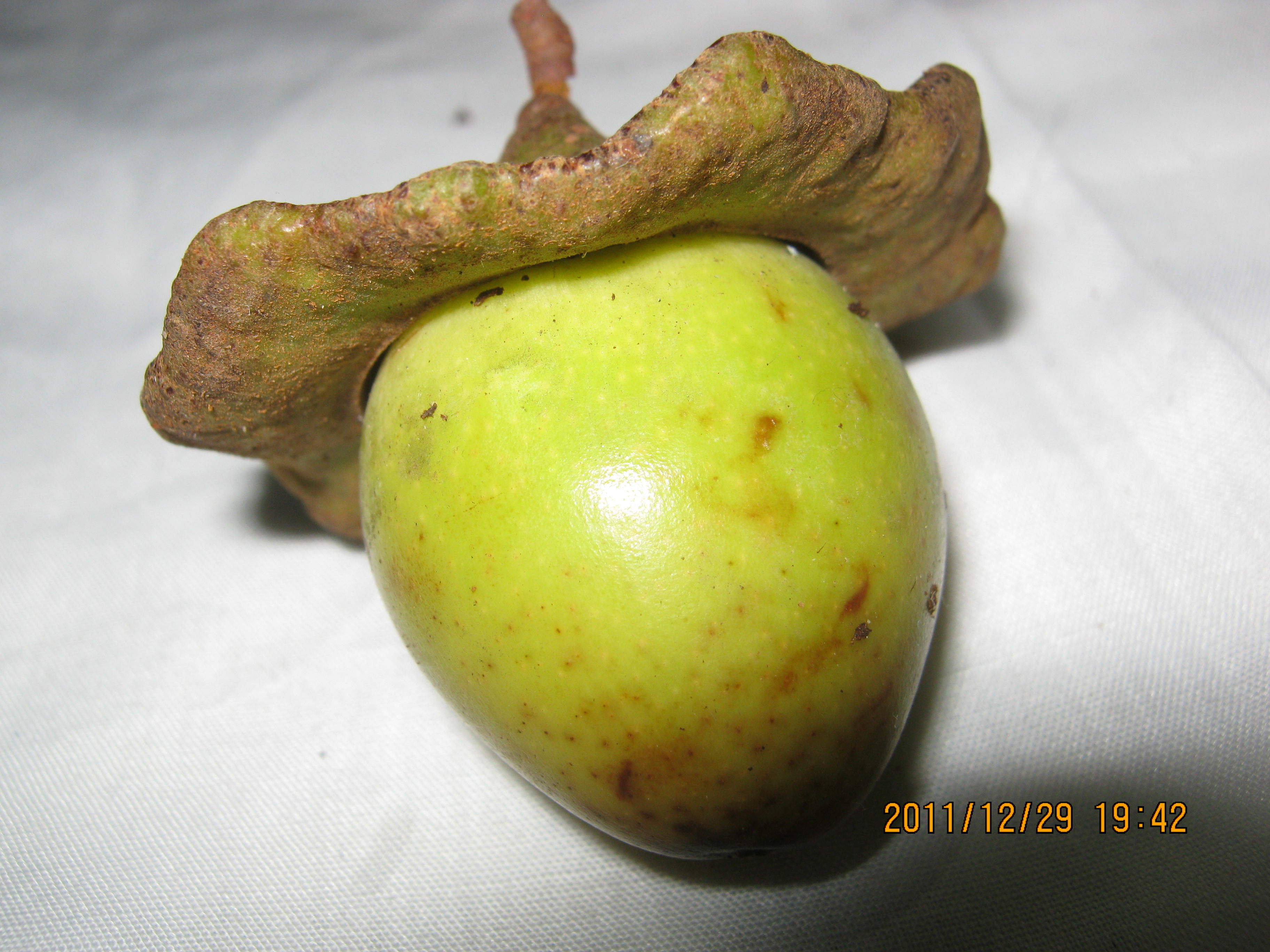 Semilla Canelo de los Andaquies